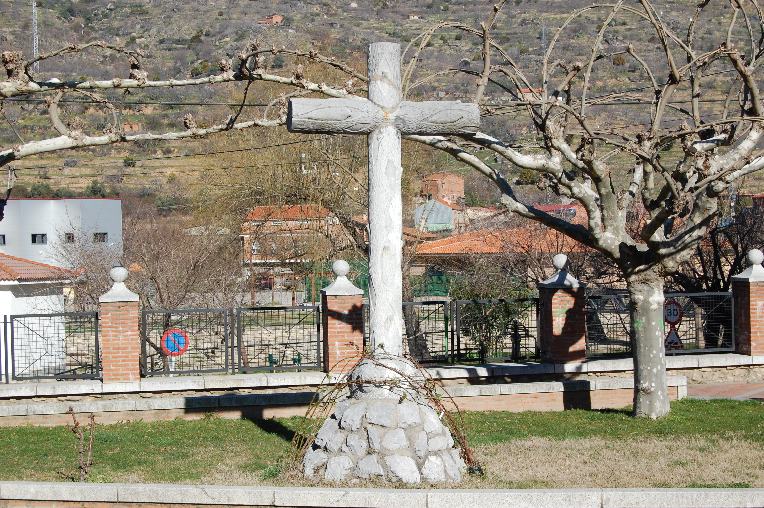 Cruz en Navaconcejo, provincia de Cáceres, España.